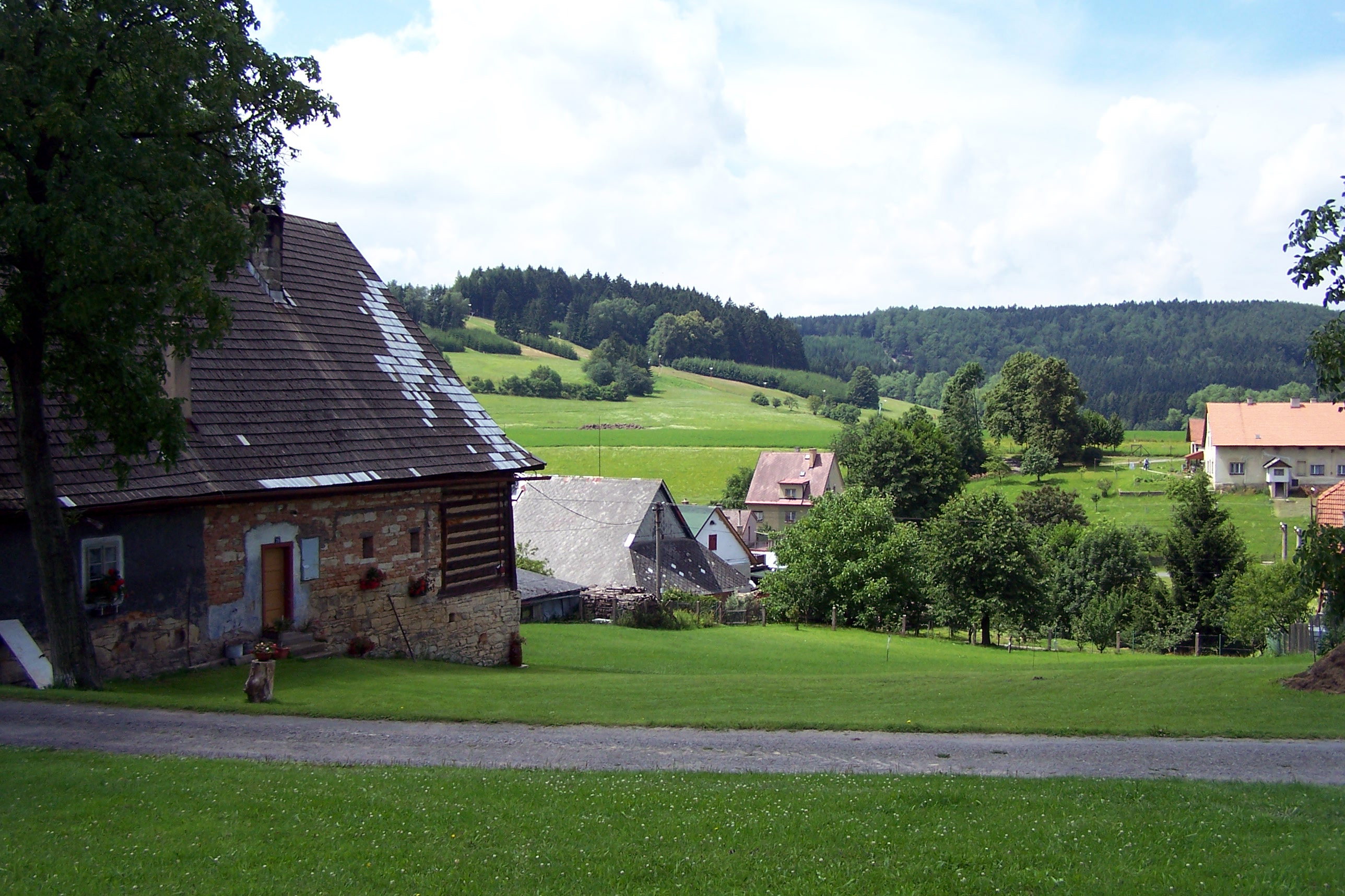 Obec Přívrat